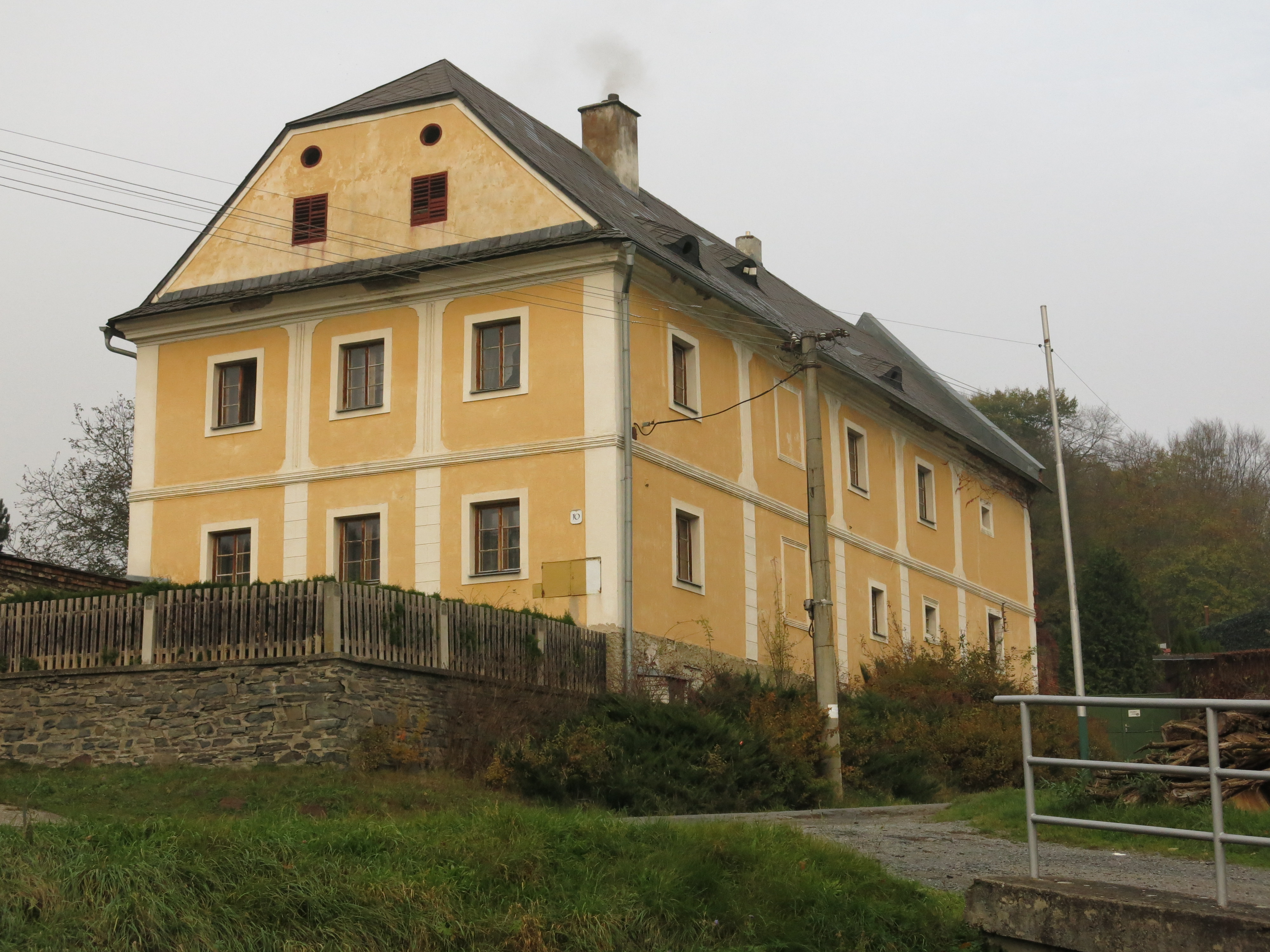 Obydlí rychtáře nad hlubočskou návsí.